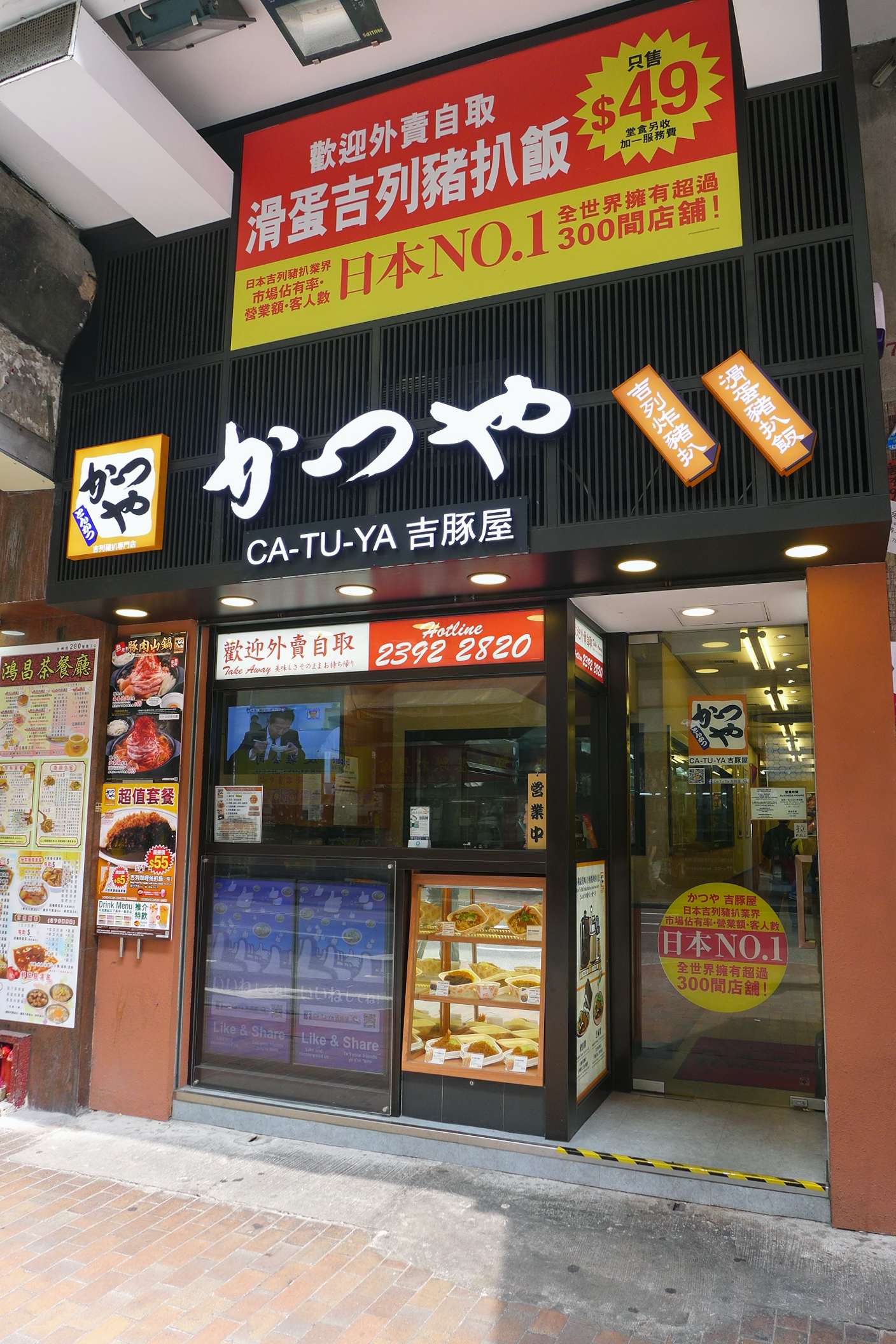 Ca-tu-ya in Sham Shui Po